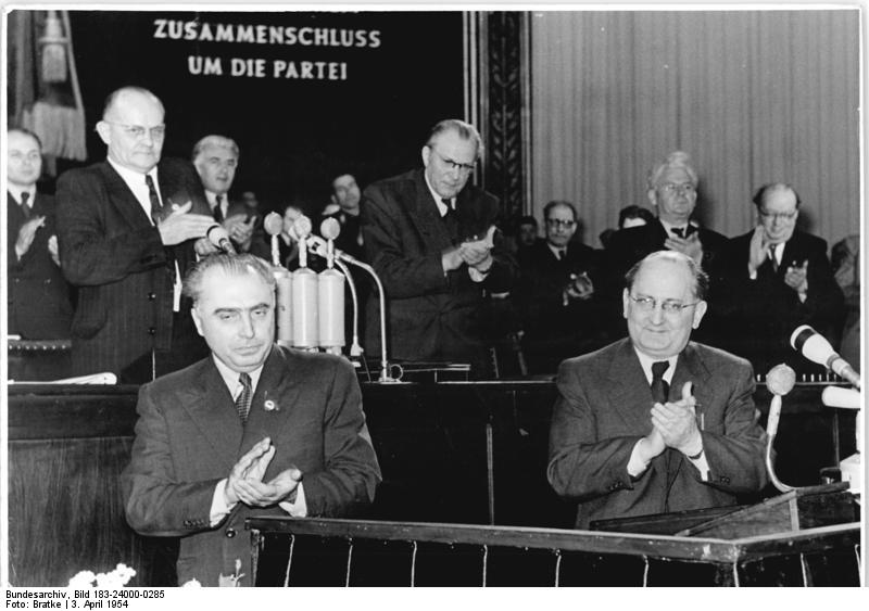 Zentralbild-Bratke Hlg.-Ho. 3.4.1954 IV. Parteitag der Sozialistischen Einheitspartei Deutschlands, Berlin, Werner-Seelenbinderhalle UBz: Das Mitglied der Rumänischen Arbeiterpartei Petre Borila überbringt die Grüsse des Zentralkomitees der Rumänischen Arbeiterpartei. linke Seite wegnehmen Foto ND-Bratke Stammabzug darf nicht aus dem Hause